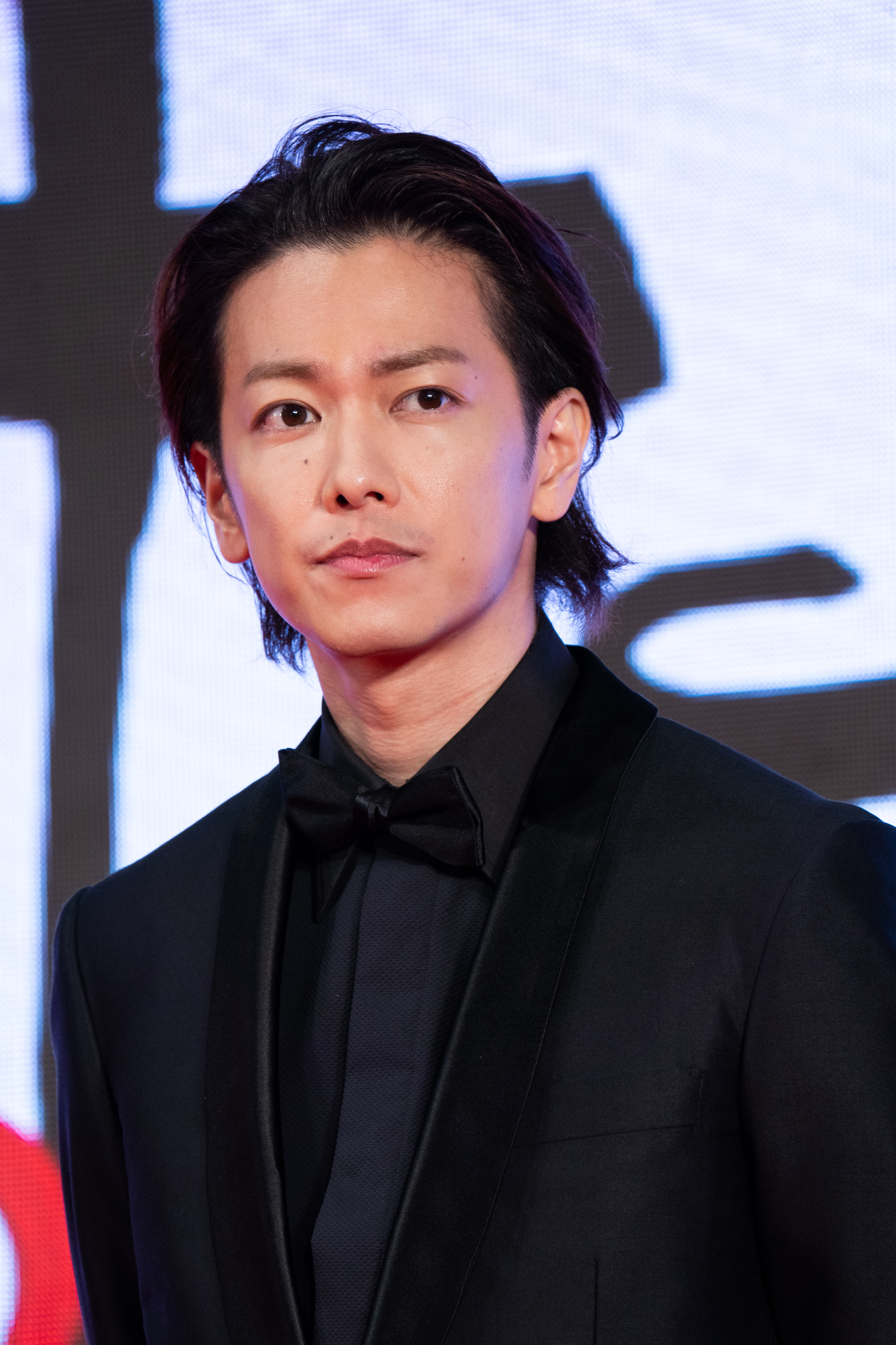 第32回 東京国際映画祭 オープニングセレモニー 佐藤健 (ひとよ)